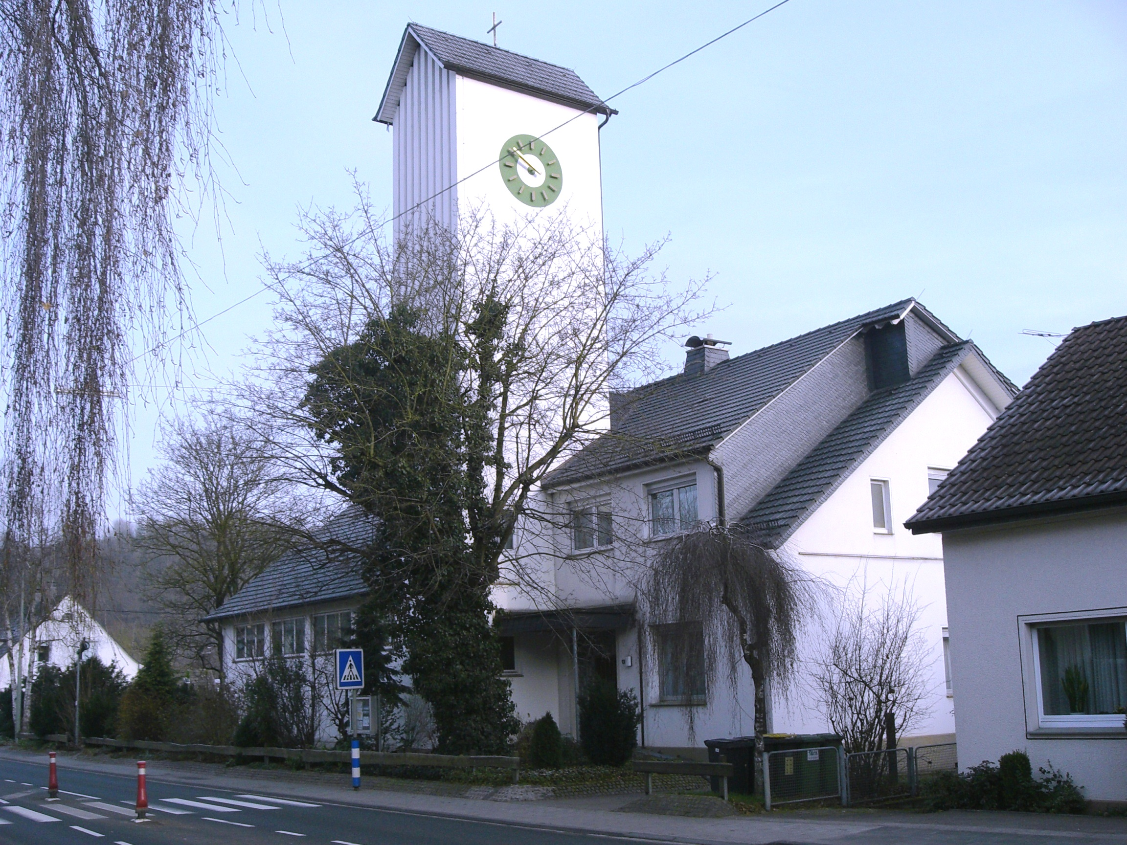 Im Jahr 1965 errichtete evangelische Kirche in Grevenbrück